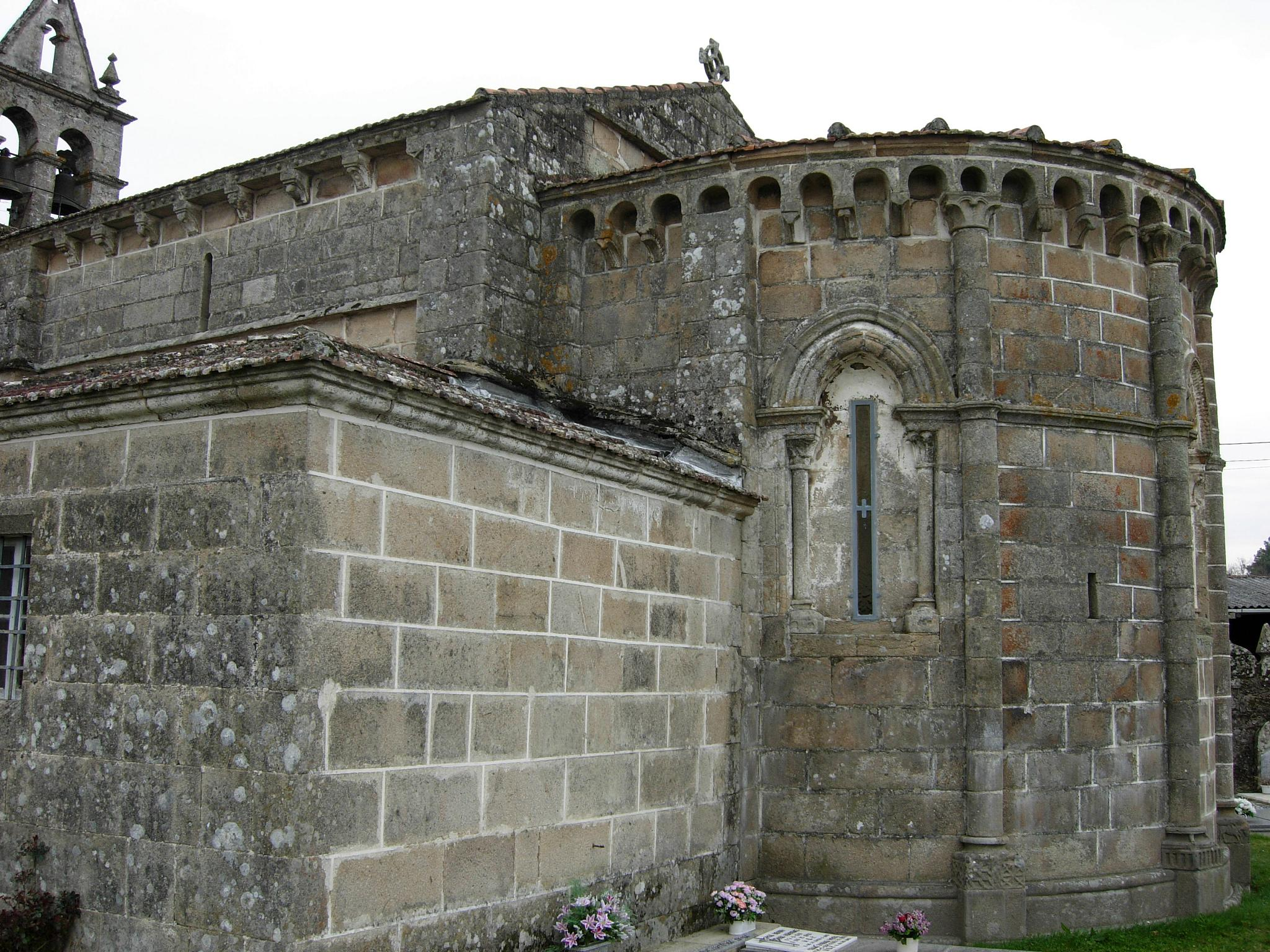 Igrexa de Santa María de Louredo, Maside, Galiza